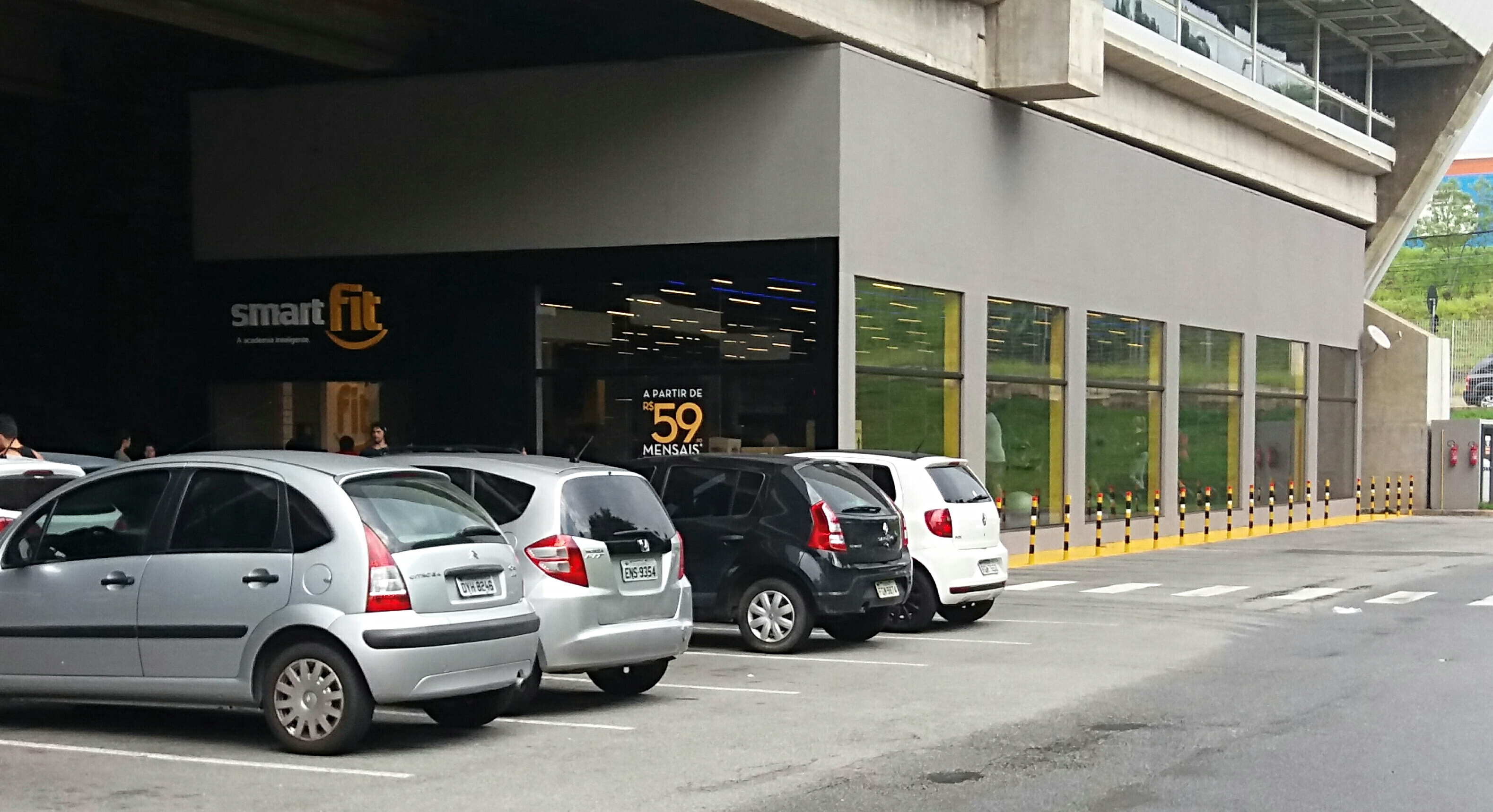 Filial da Smart Fit próxima ao Terminal e Shopping Itaquera